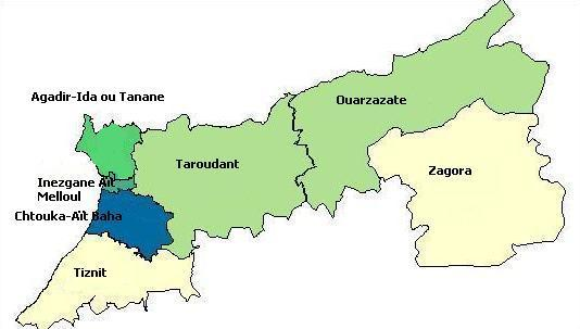 Carte géographique représentant le découpage administratif de la région Souss Massa Draa